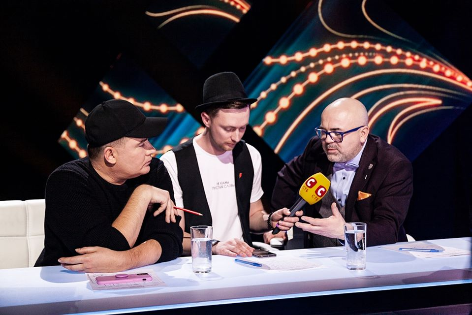 Backstage